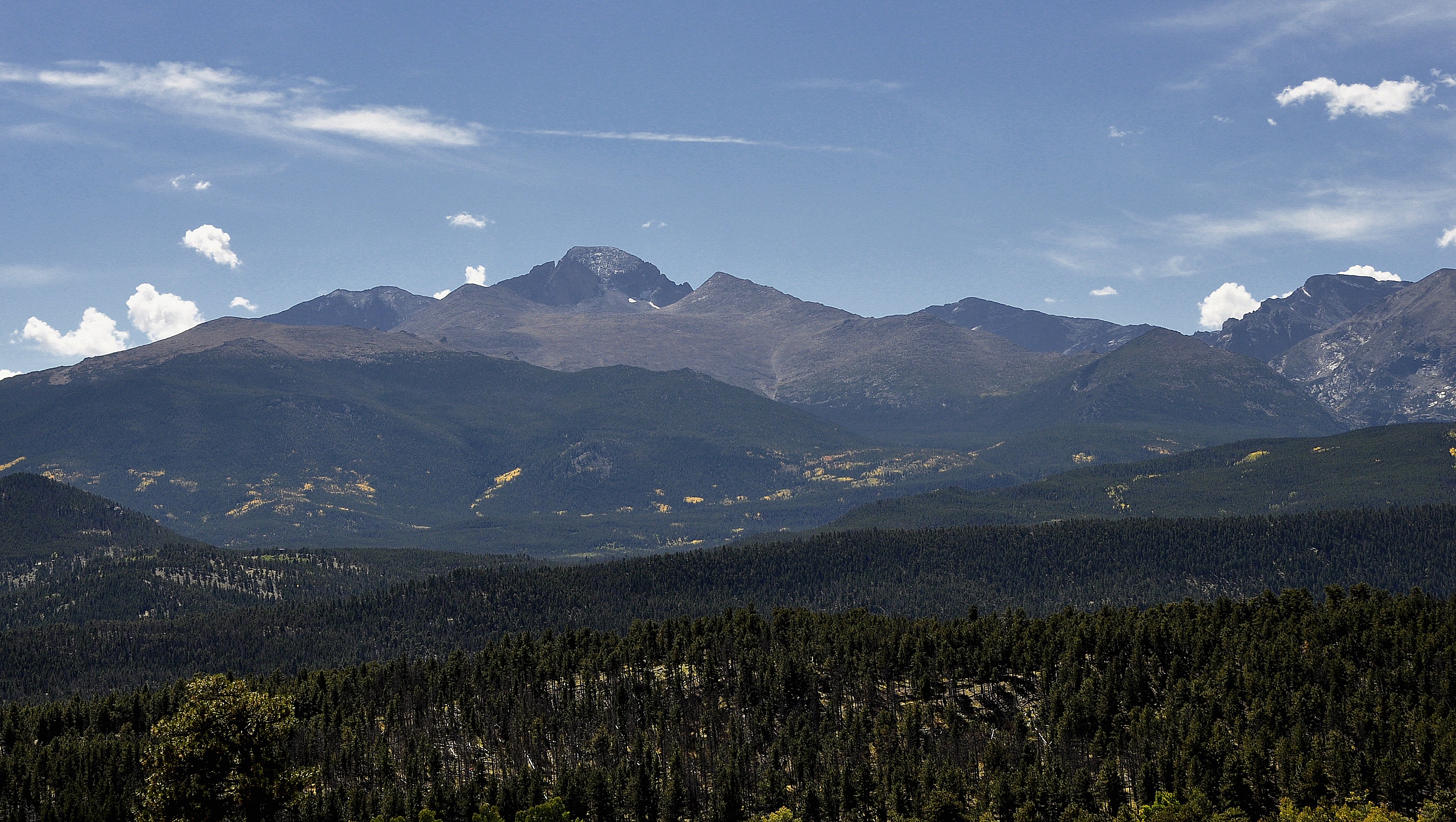 Longs Peak in het Rocky Mountain National Park, Colorado, USA